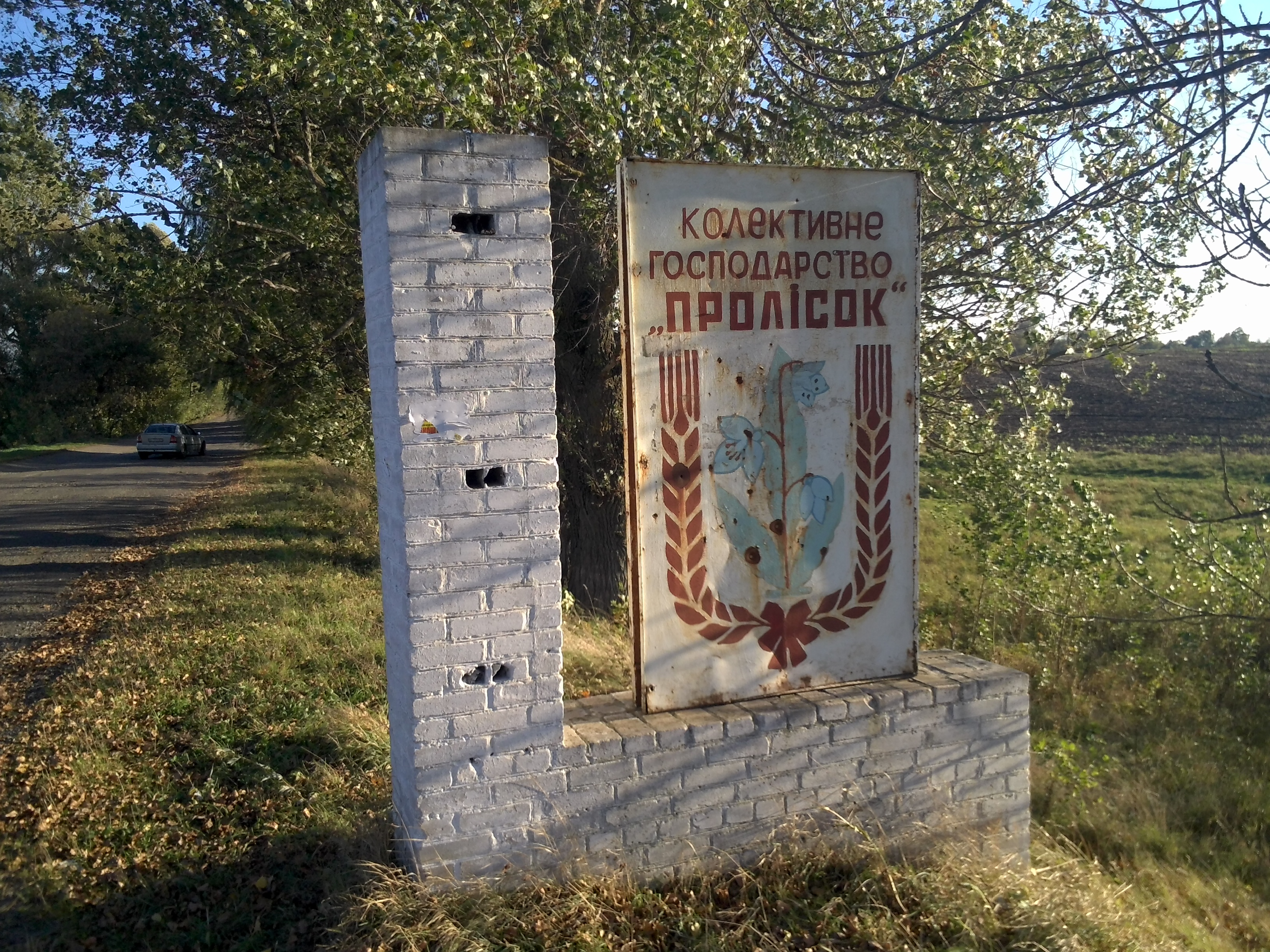 с. Флоріанівка